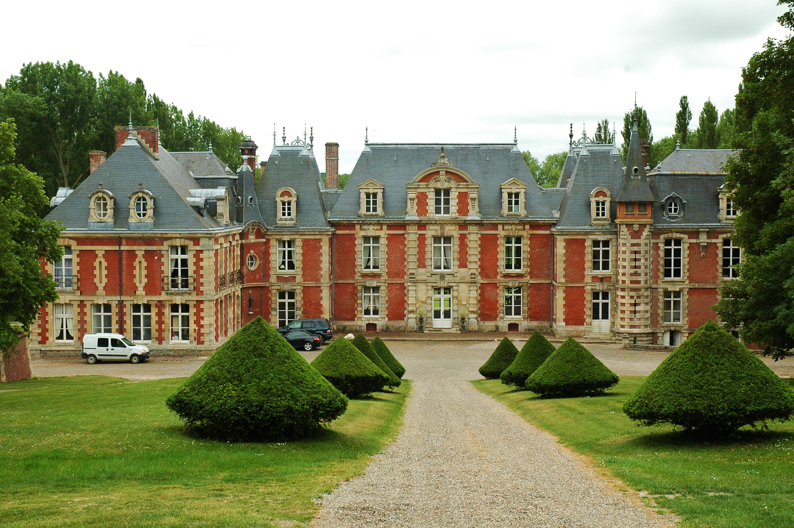 Suzanne (Somme, France). Le château.